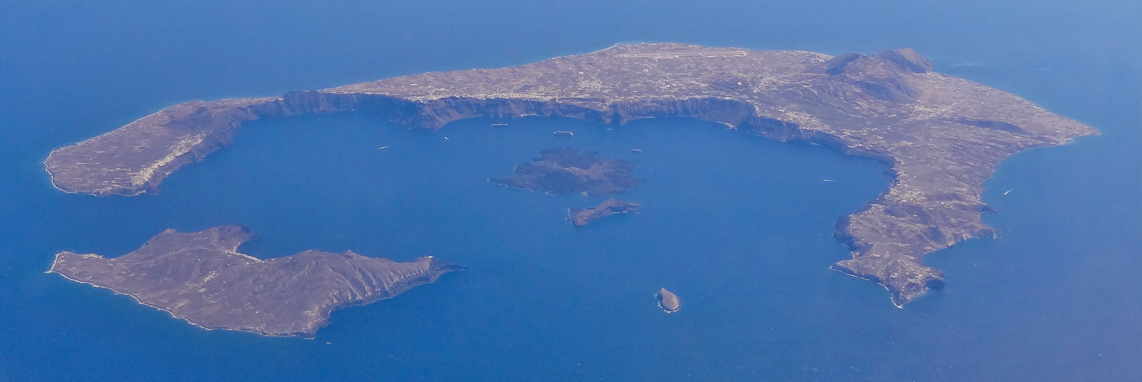 Inselgruppe von Santorin (Σαντορίνη), Gemeinde Thira, Kykladen, südliche Ägäis, Griechenland